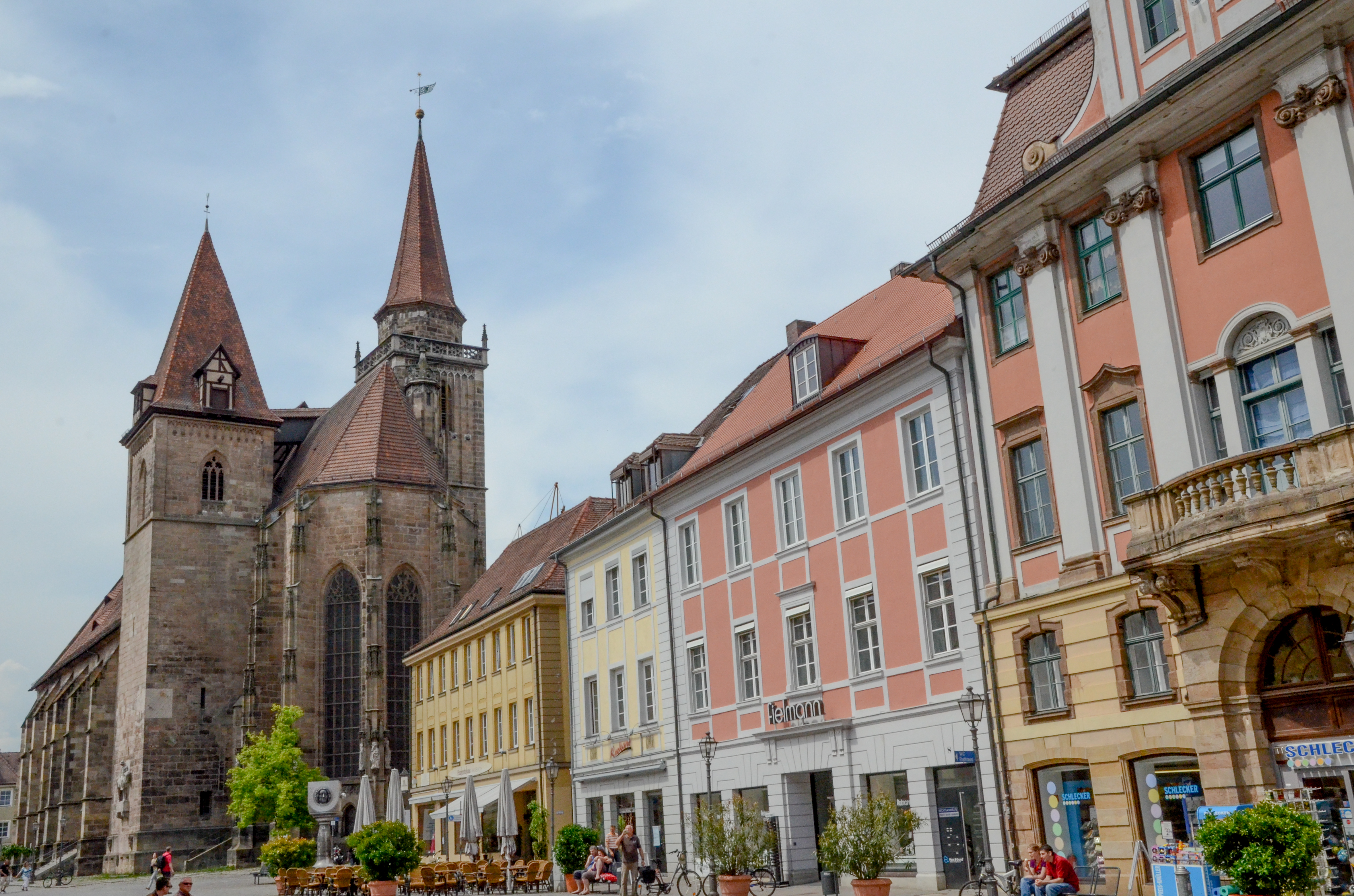 evang.-luth. Kirche St. Johannis in Ansbach